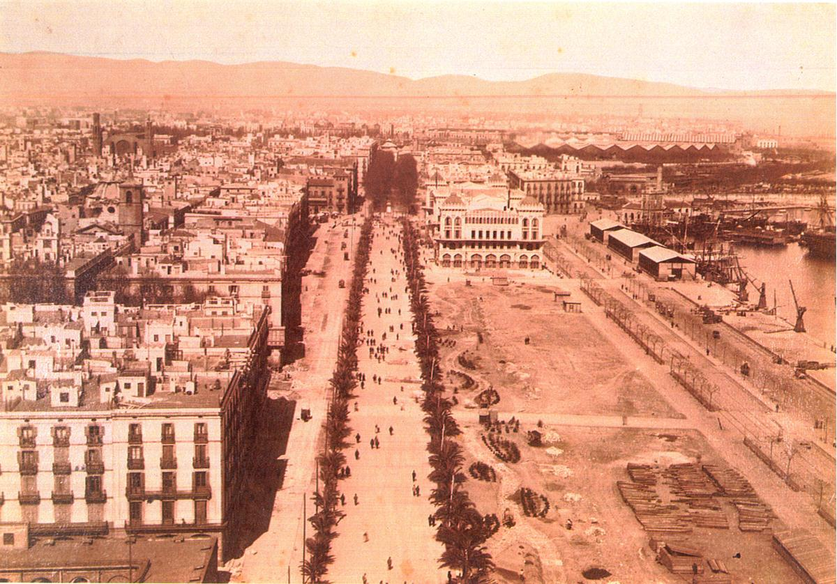 Gran Hotel Internacional Barcelona 1888 - 1889. Blick von der Kolumbussäule.